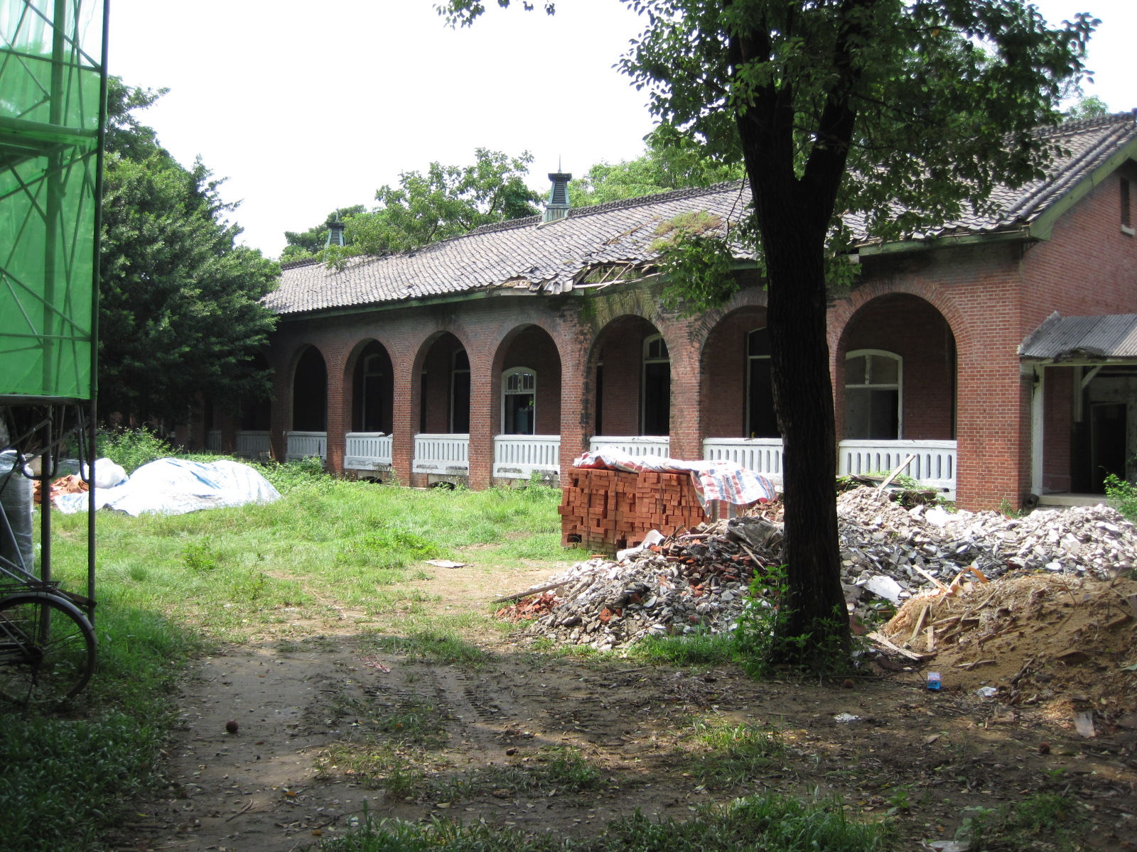 中文（台灣）: 位於臺南成功大學力行校區的原日軍衛戍病院。